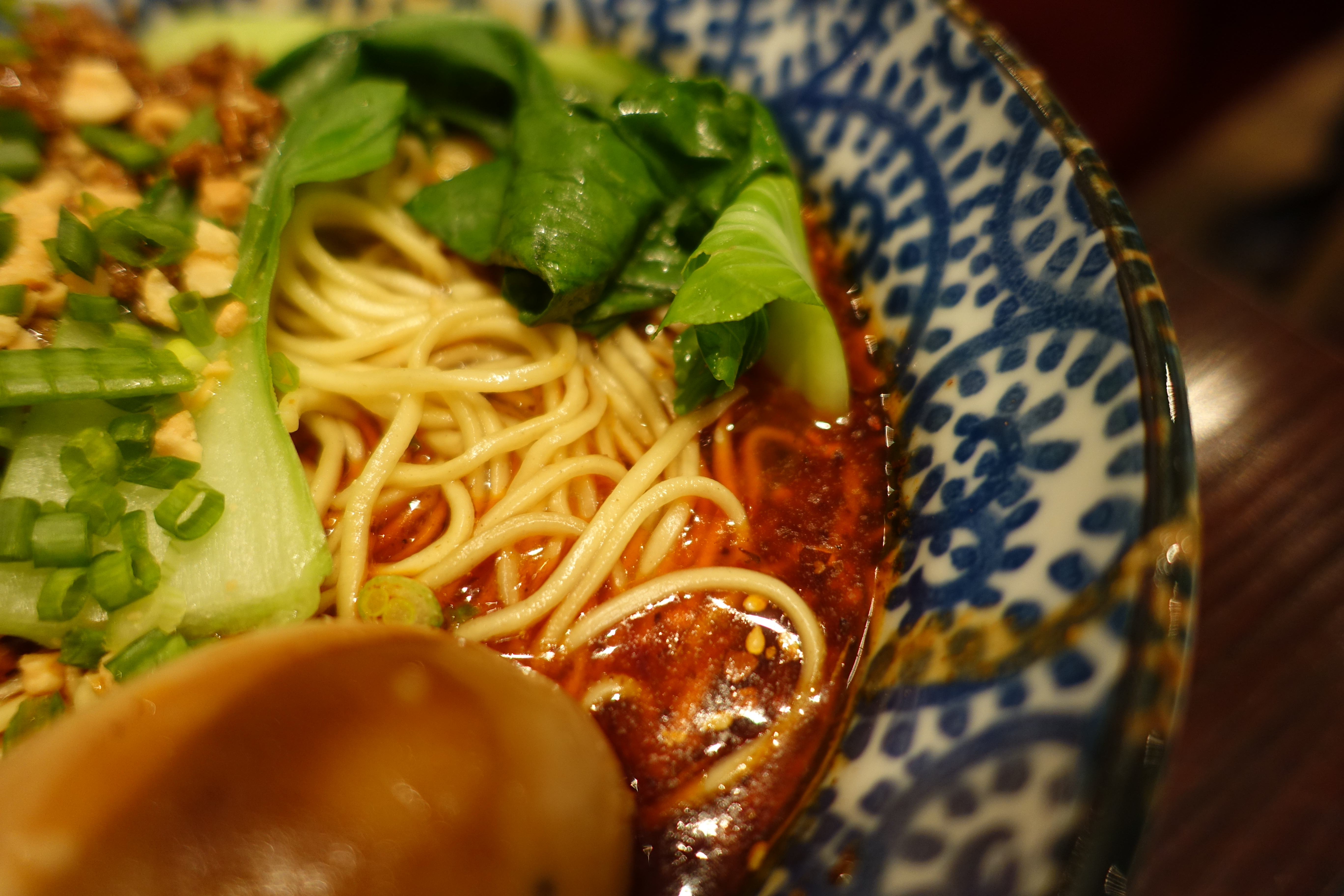 ChongQing Noodles @ Sucrépicé @ Paris